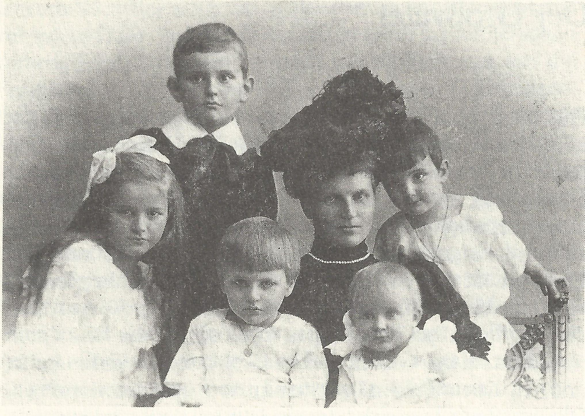 Alexander, Fürst zu Dohna-Schlobitten mit Mutter (Marie Mathilde geb. Prinzessin zu Solms-Hohensolms-Lich) und Geschwistern, 1906; von links Ursula Anna, Alexander, Victor-Adalbert, Agnes und Christof. Die Familie wohnte zu der Zeit bei Alexanders Großvater Richard Wilhelm Fürst zu Dohna auf dem Gut Behlenhof (und während Umbau des Gutshauses in Schlobitten).